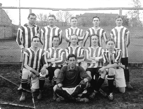 Збірна з футболу Одеського британського атлетичного клубу(ОБАК): Ленінстан, Маркузе, Мартін, Овен, Карр, Перкінс, Кук, Ярендт, Джекобс, Джонес, Бейд.